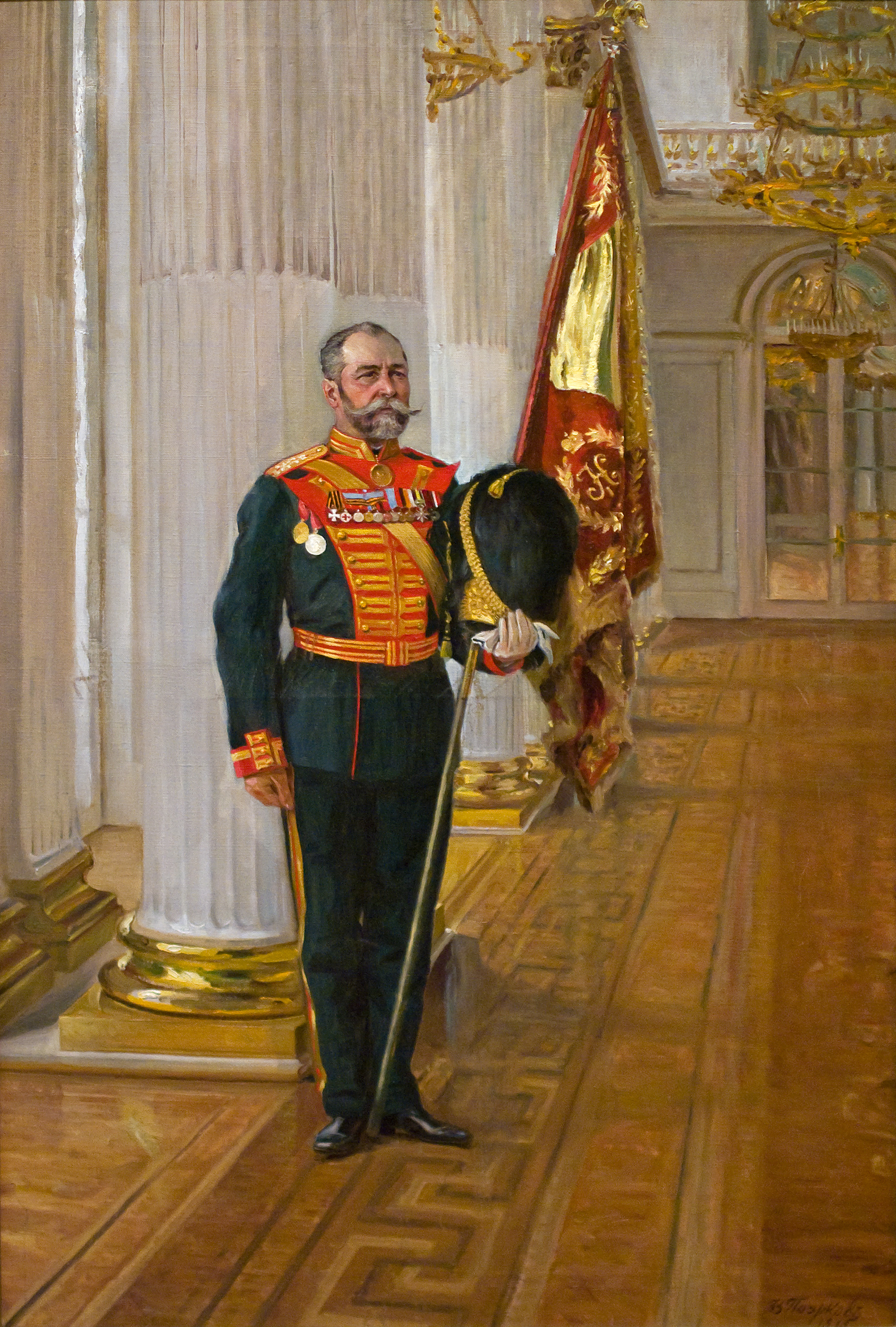 Владимир Поярков (1869-?) Знаменщик Роты Дворцовых Гренадер. 1915. Холст, Масло